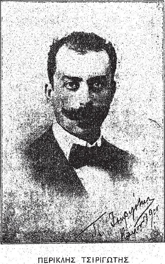 griechischer Künstler, 19. Jahrhundert